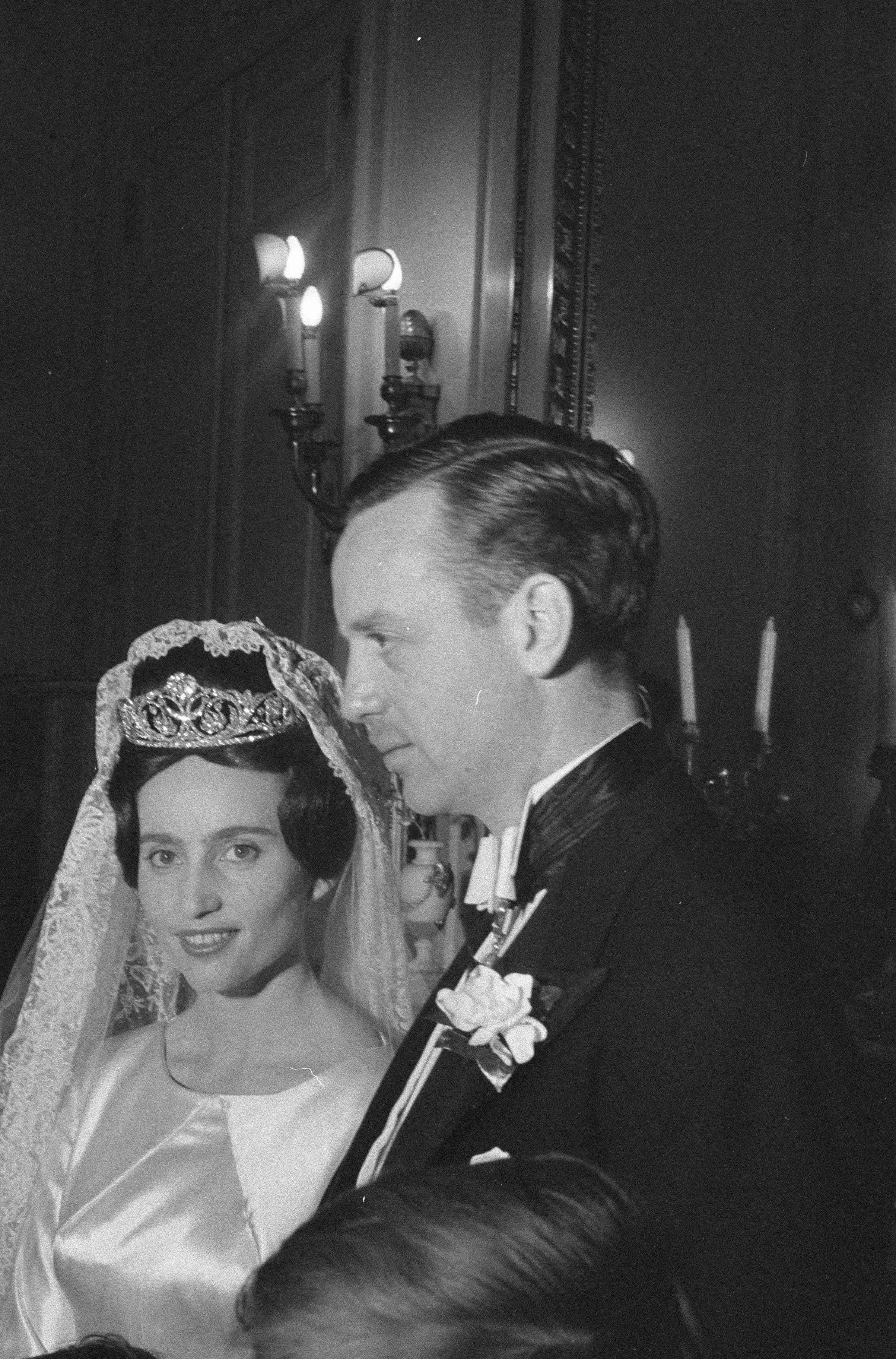 Collectie / Archief : Fotocollectie Anefo Reportage / Serie : [ onbekend ] Beschrijving : Huwelijk van Prinses Francoise van Bourbon Parma met Prins Eduard van Lobkowicz in Parijs, het paar na de huwelijksinzegening Datum : 7 januari 1960 Locatie : Frankrijk, Parijs Trefwoorden : huwelijken, huwelijksinzegeningen Persoonsnaam : Prins Eduard van Lobkowicz Fotograaf : Pot, Harry / Anefo Auteursrechthebbende : Nationaal Archief Materiaalsoort : Negatief (zwart/wit) Nummer archiefinventaris : bekijk toegang 2.24.01.05 Bestanddeelnummer : 910-9261